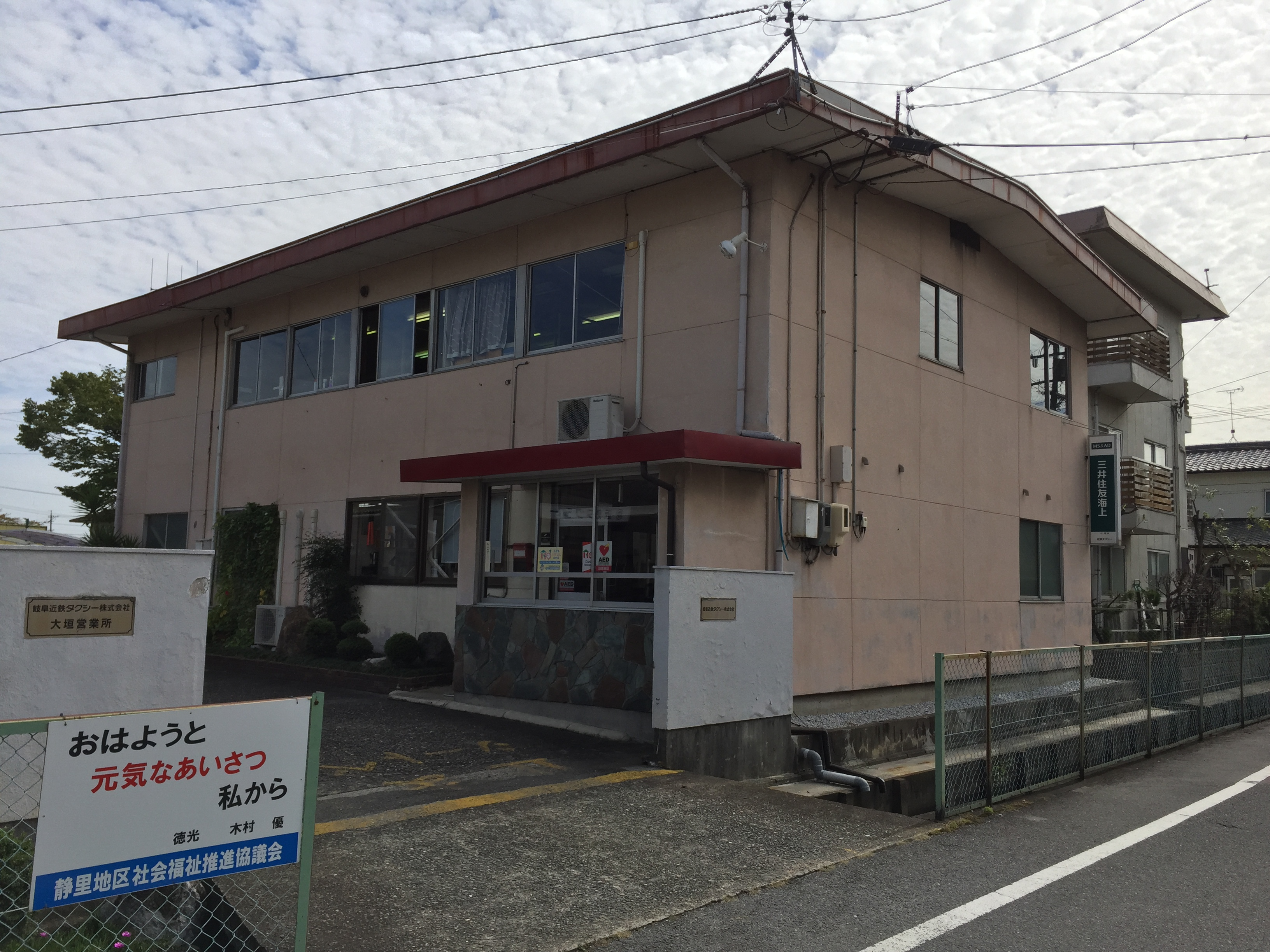 岐阜県大垣市